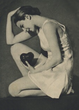 Anka Čekanová (Pestrý týden 1927)